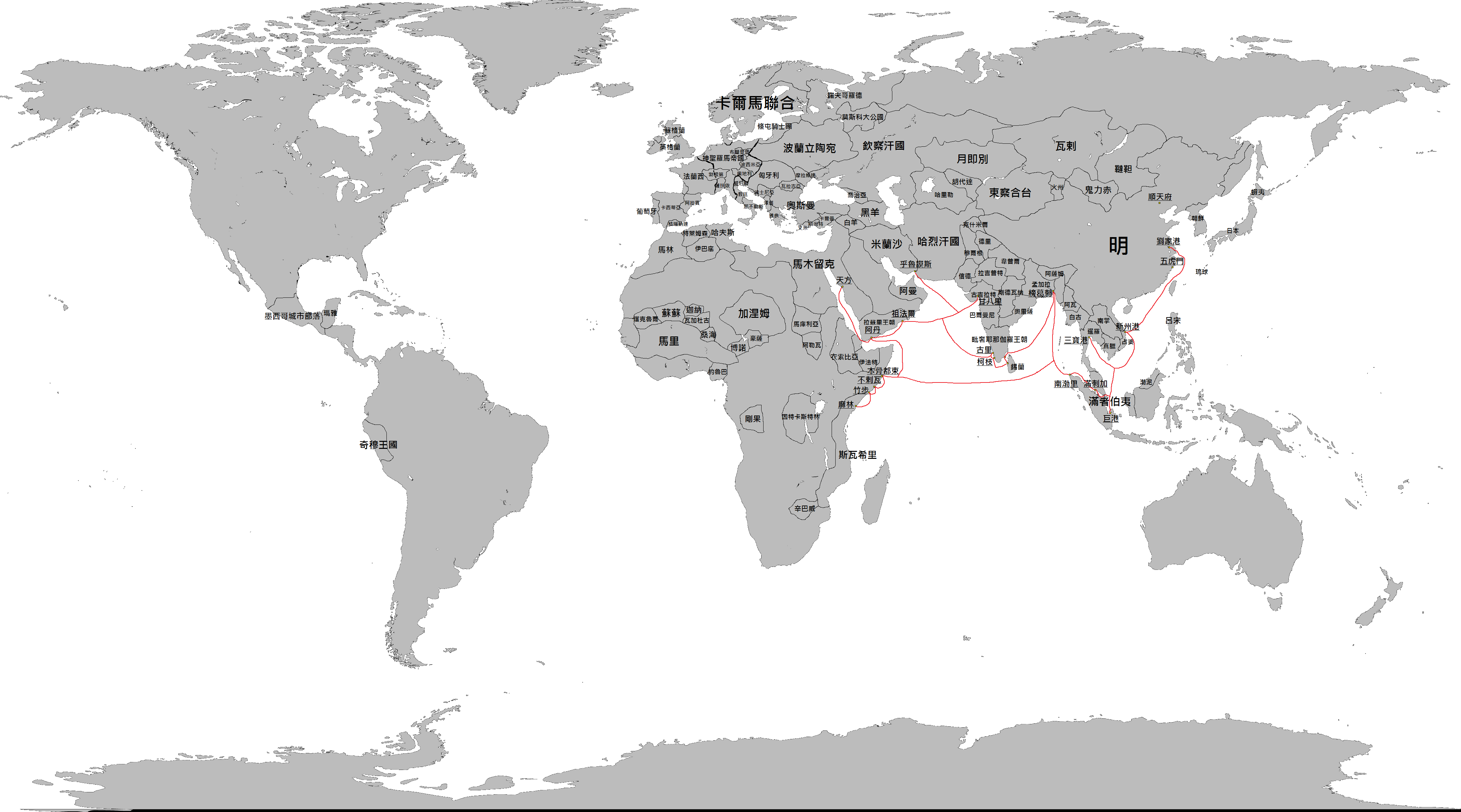 鄭和下西洋時代之世界地圖